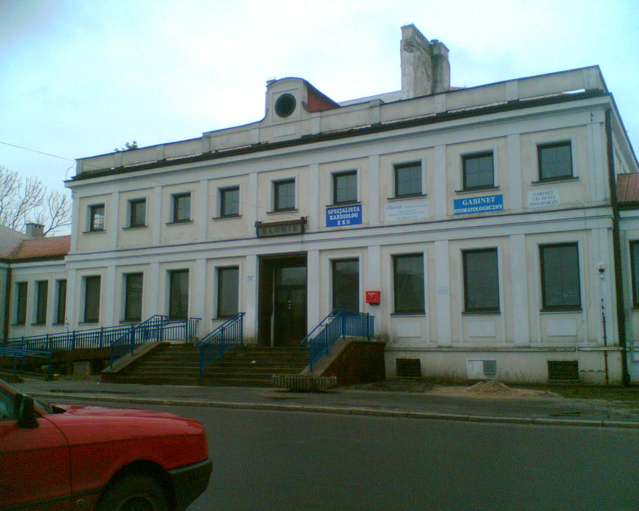 Stacja PKP w Błoniu